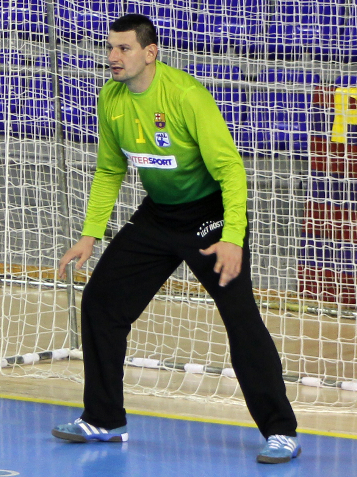 Arpad Šterbik in a 2012-13 Barcelona goalkeeper uniform Foto realizada por Javier Segura (@castroquini)